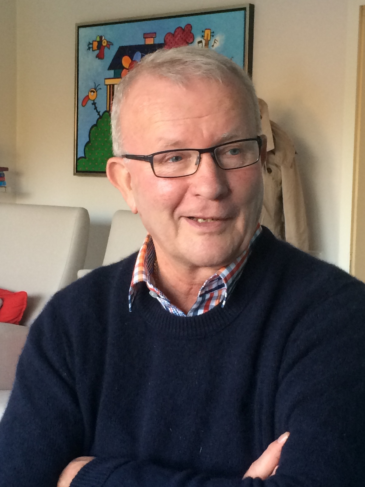 Uwe Peter Zimmer heute